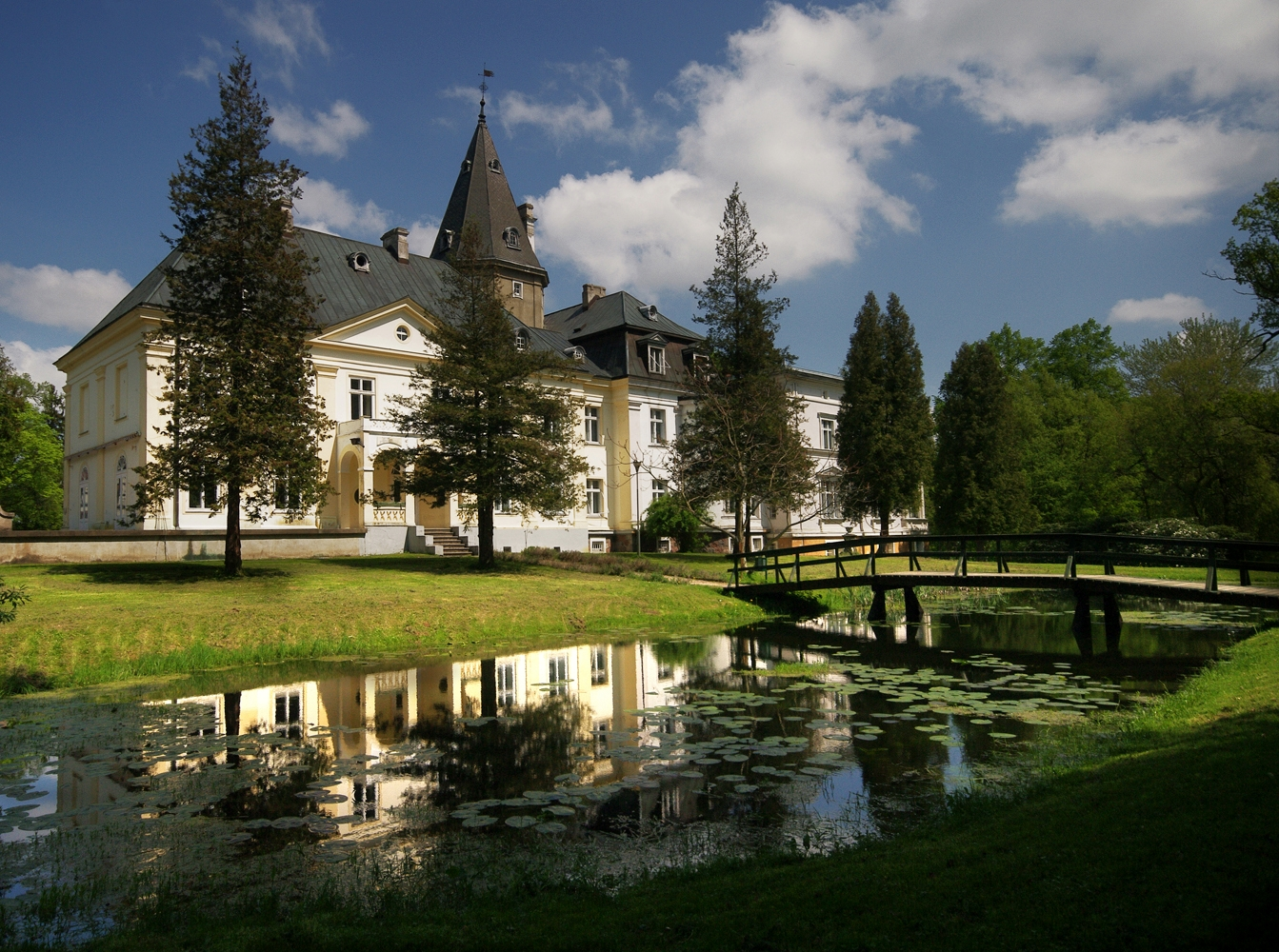 Dawna posiadłość Bismarcków, dziś szkoła leśna.